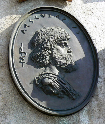 Aesculapius tondó a Széchenyi-patika homlokzatán